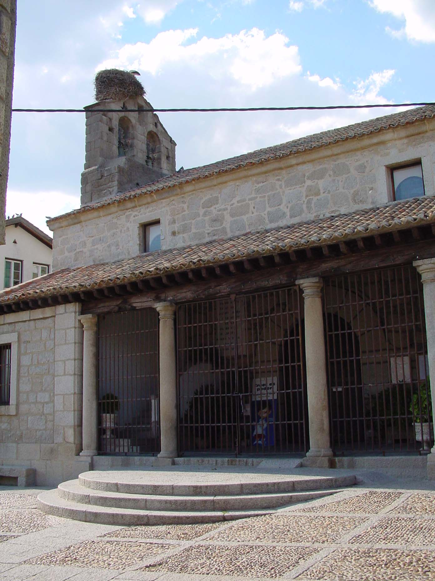 Parroquia de la Purísima Concepción en Los Molinos.